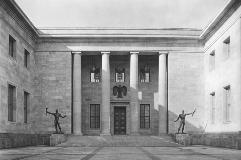 Neue Reichskanzlei in Berlin Architekt Prof. Albert Speer Eingang vom Ehrenhof mit Freitreppe